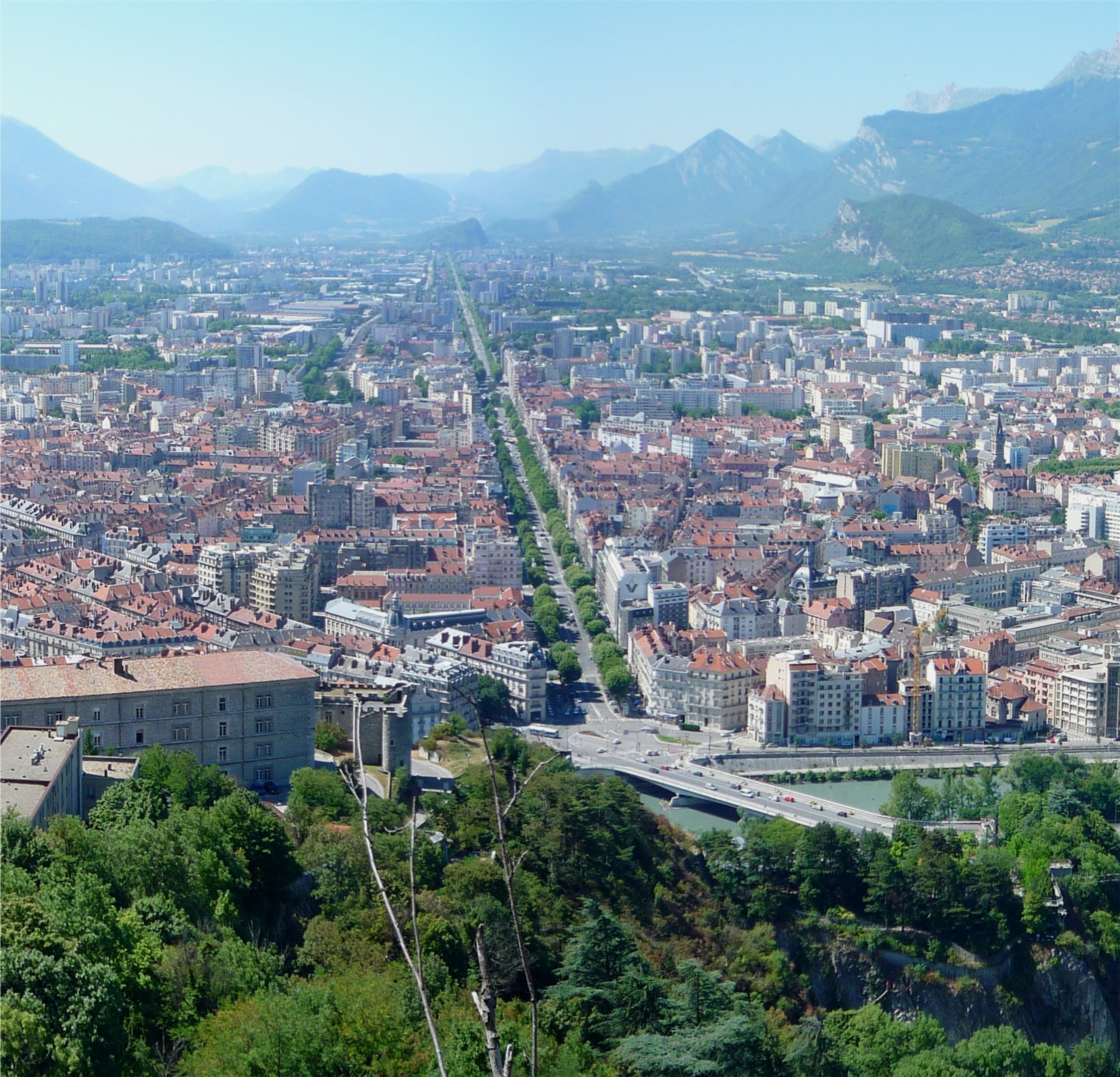 Cours jean jaurès - Grenoble